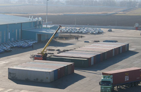 Ильичёвский завод автомобильных агрегатов.Корпус №3 и контейнерная площадка.